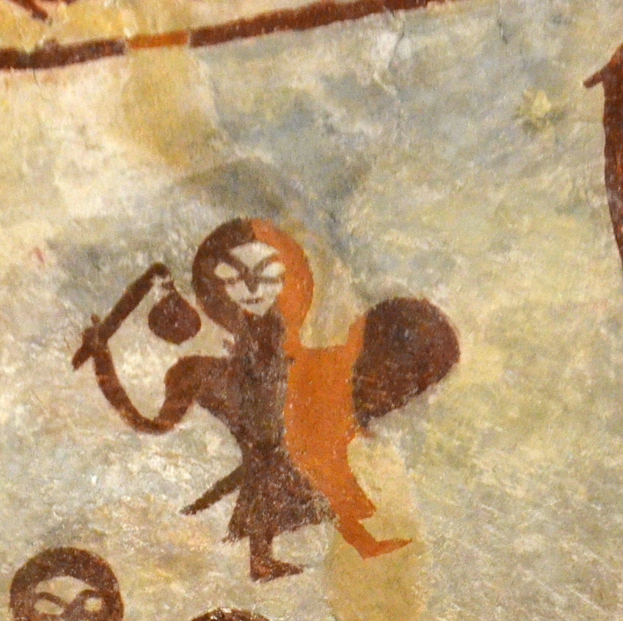 Alaitzako eliza erromanikoa, bere margolan ikusgarri bezain bereziekin.